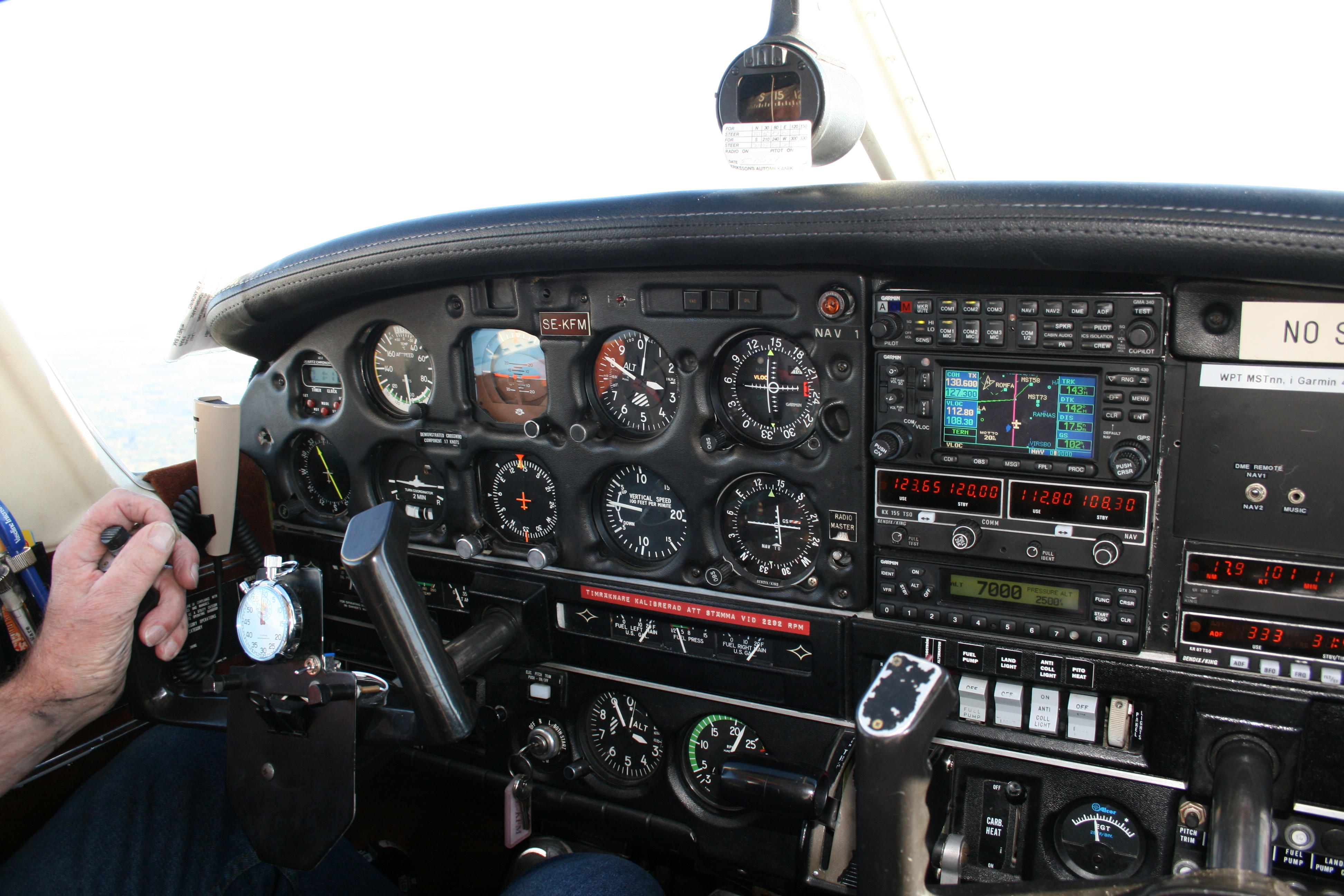 Piper PA-28-181 Archer II instrumentbräda/dashboard